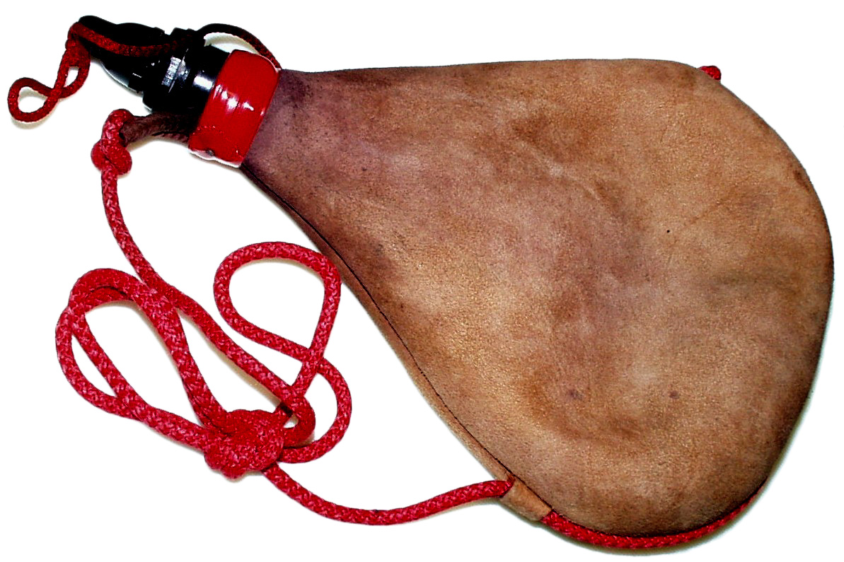 Bota de vino Taken by myself